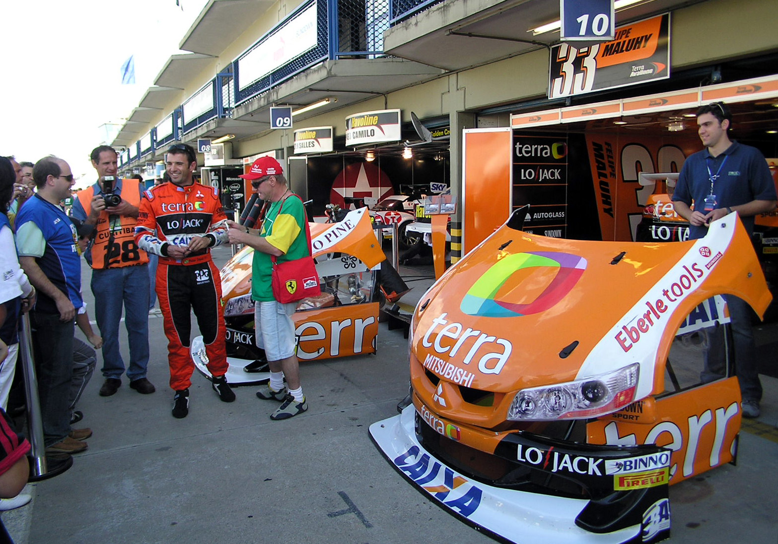 Christian Fittipaldi and Terra-Avallone Motorsport in Curitiba, April 2006.